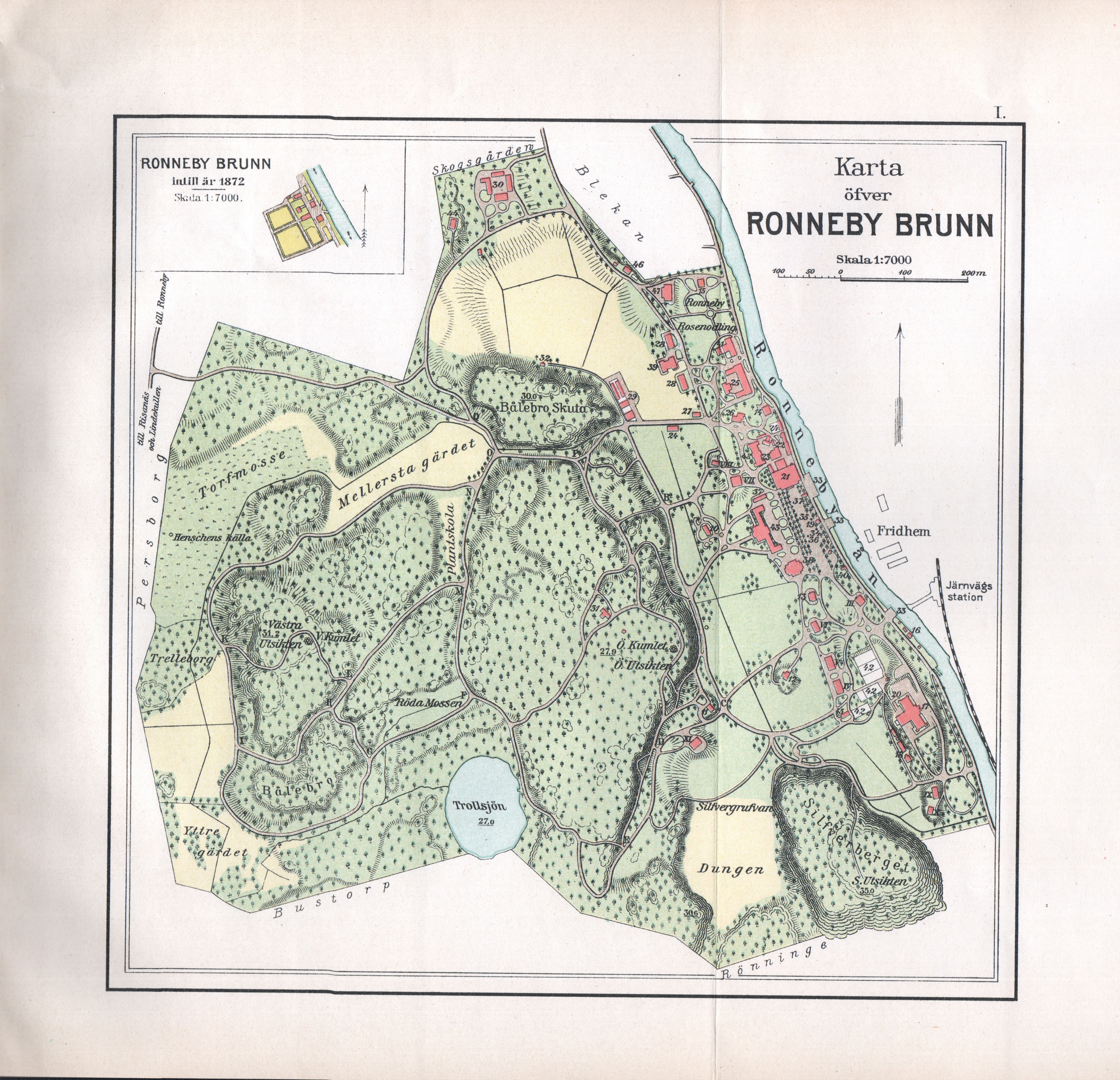 Karta öfver Ronneby Brunn 1872 Förklaring af siffror och bokstäfver å kartan öfver nuvarande brunnsområdet. III—XI Villor 10 Öfverläkarens villa 11 Direktörens villa 12 Villa Vera 13 Villa G. 14 Villa Castagna 15 Villa L. 16 Villa S. 17 Brunnshotellet 18 Ekonomihus 19 Gamla källan 20 Brunnskontor(i hotellet) 21 Badhus N:r I 22 Gamla kontoret 23 Vattenfabrik 24 Förrådshus 25 Badhus N:r II och III, Restauration 26 Bostad för biträdande läkare, kliniskt laboratorium 27 Fotografi-Atelier 28 Sjukhem 29 Hyrstall 30 Trädgårdsmästareboställe 31 Skogshyddan 32 Bårhus 33 Ångbåtsbryggor 34 Berzelii källa 35 Abelins källa 36 Nya källan • Brunn. 37 Butiker 38 Gymnastik 39 Lasarett 40 Klosett för herrar 41 Restaurant Flora 42 Idrottsplan 43 Brunnshall 44 Musik-bostad 45 Cycle-stall 46 Villa Svea 47 Fröken Hviids pensionat 48 Kallvattenkur Bokstäfverna vid vägkorsningarna hänvisa till å marken utsatta stenar med samma beteckning och uppdragna norrstreck. De understrukna siffrorna angifva höjden i meter öfver hafvet.